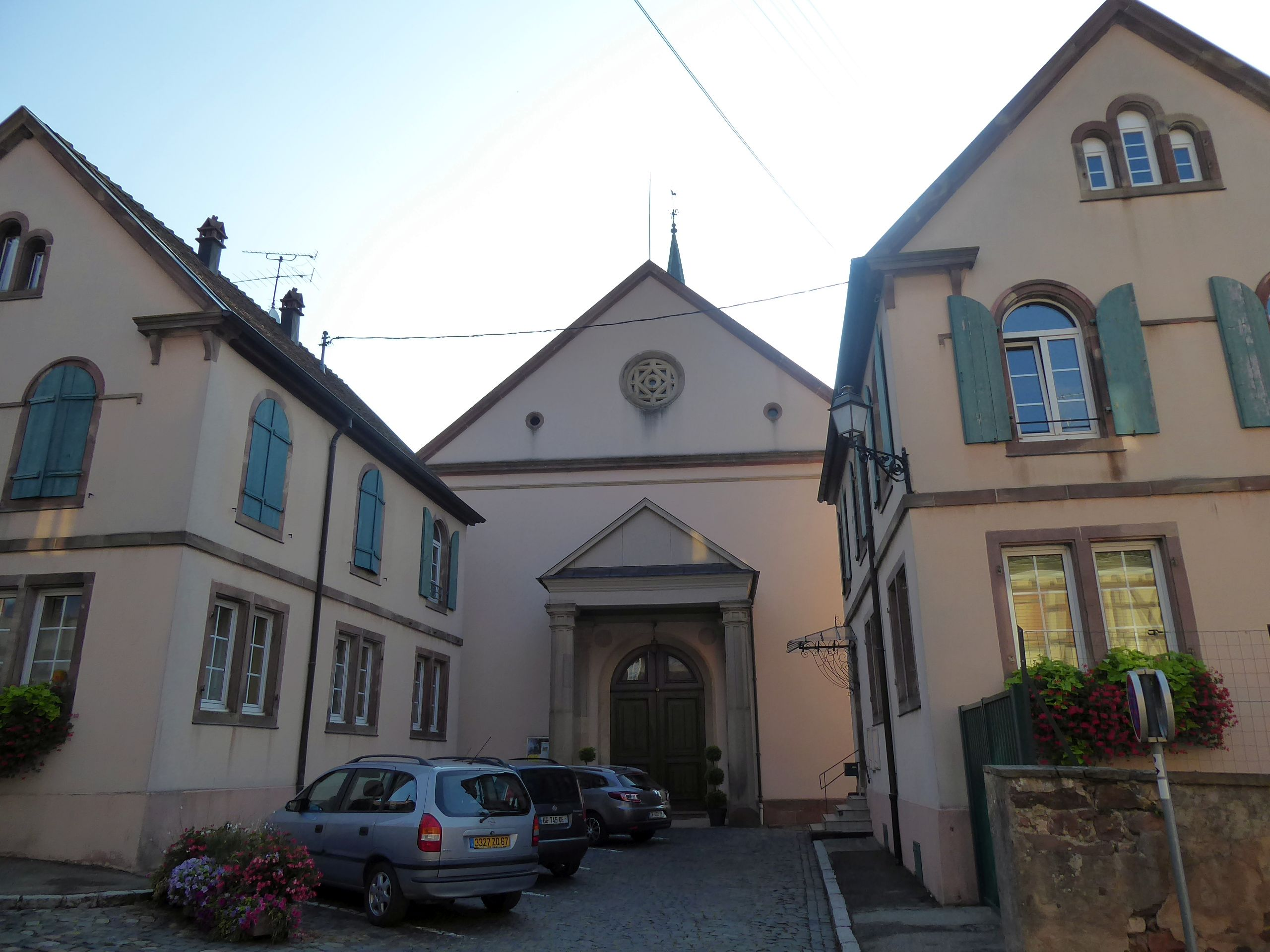 Eglise Saint-Jean-Baptiste de Heiligenstein